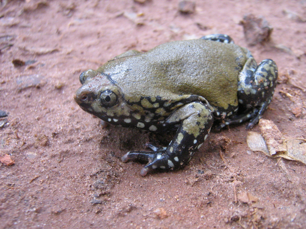 Dermatonotus muelleri